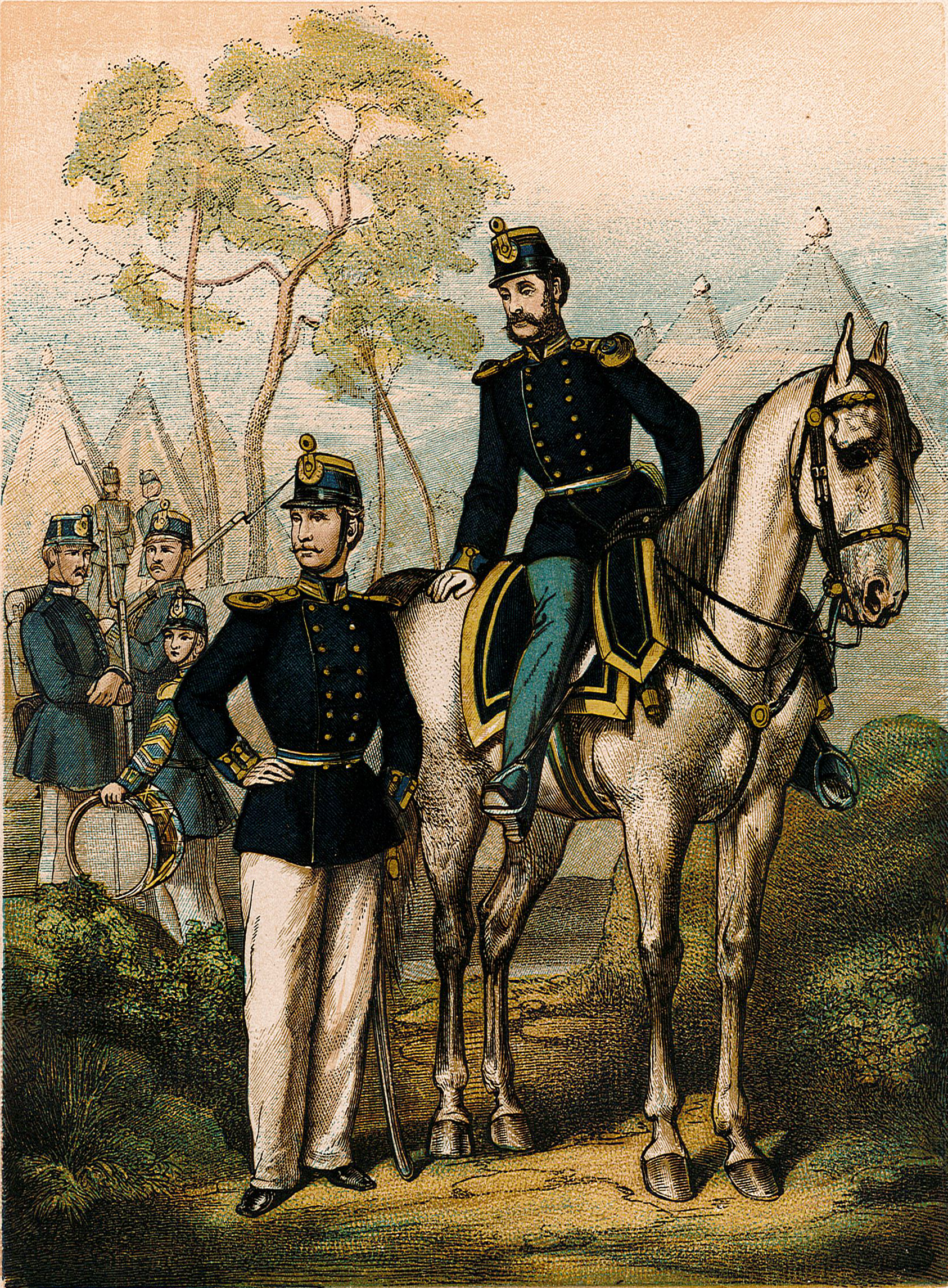 Uniformer för ”Kongl. Elfsborgs Reg:te. Kongl. Bohusläns Reg:te. Kongl. Westgöta-Dals Reg:te. Kongl. Westmanlands Reg:te.”